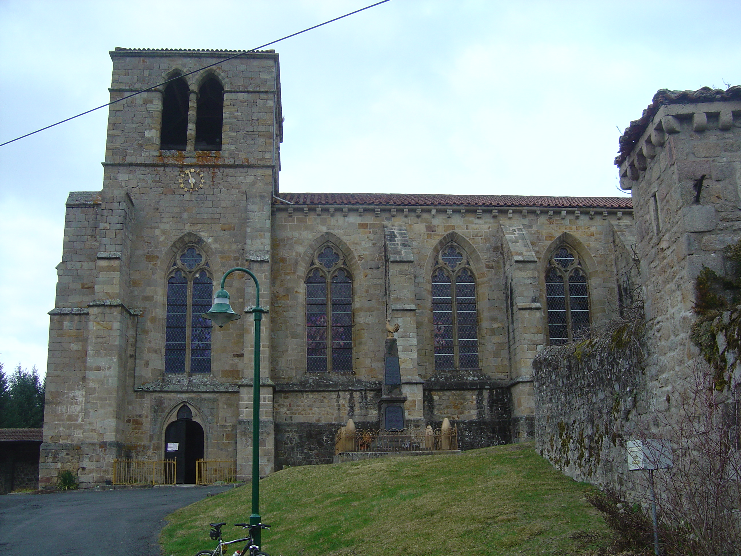 Eglise du XIVéme siècle à Sauviat